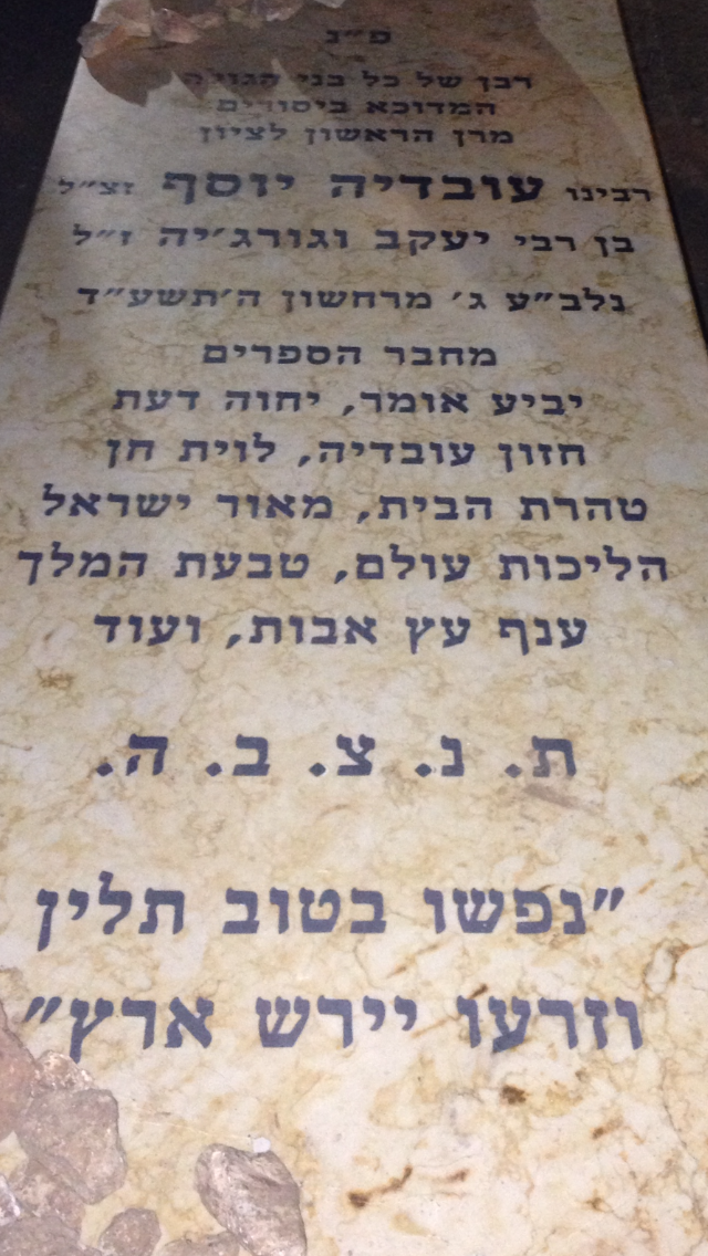 מצבת הרב עובדיה יוסף זצוק"ל